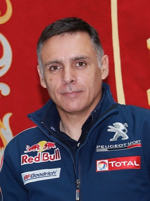 Hoy rendimos un merecido homenaje a Carlos Sainz y Lucas Cruz , ganadores del durísimo Dakar 2018 y dos figuras extraordinarias del mundo del motor. La victoria en el Dakar 2018 es una magnífica ocasión para darnos cuenta de lo lejos que pueden llegar un madrileño y un catalán, trabajando en equipo. Carlos Sainz y Lucas Cruz son un ejemplo y representan los mejores valores del deporte.